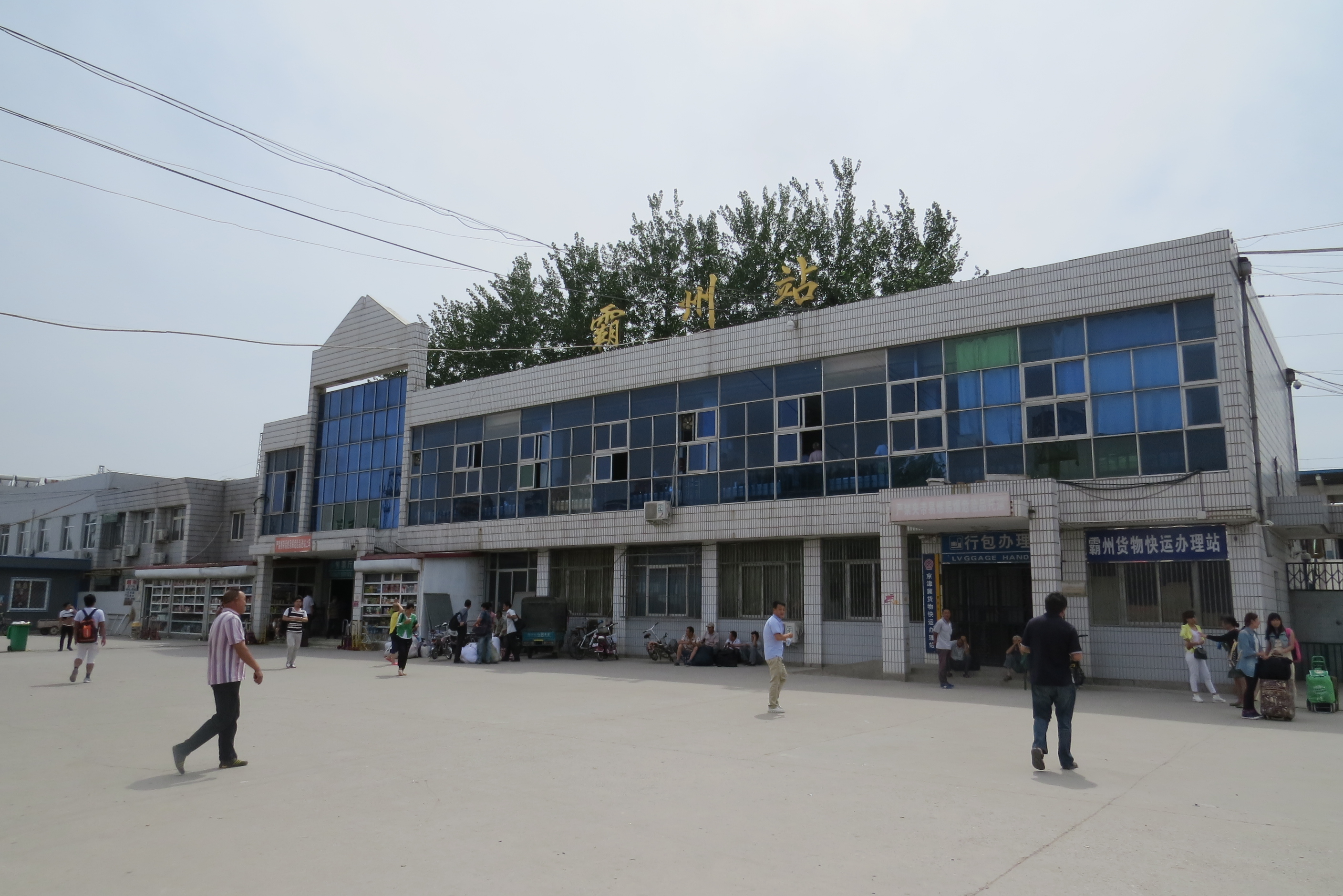 霸州火车站